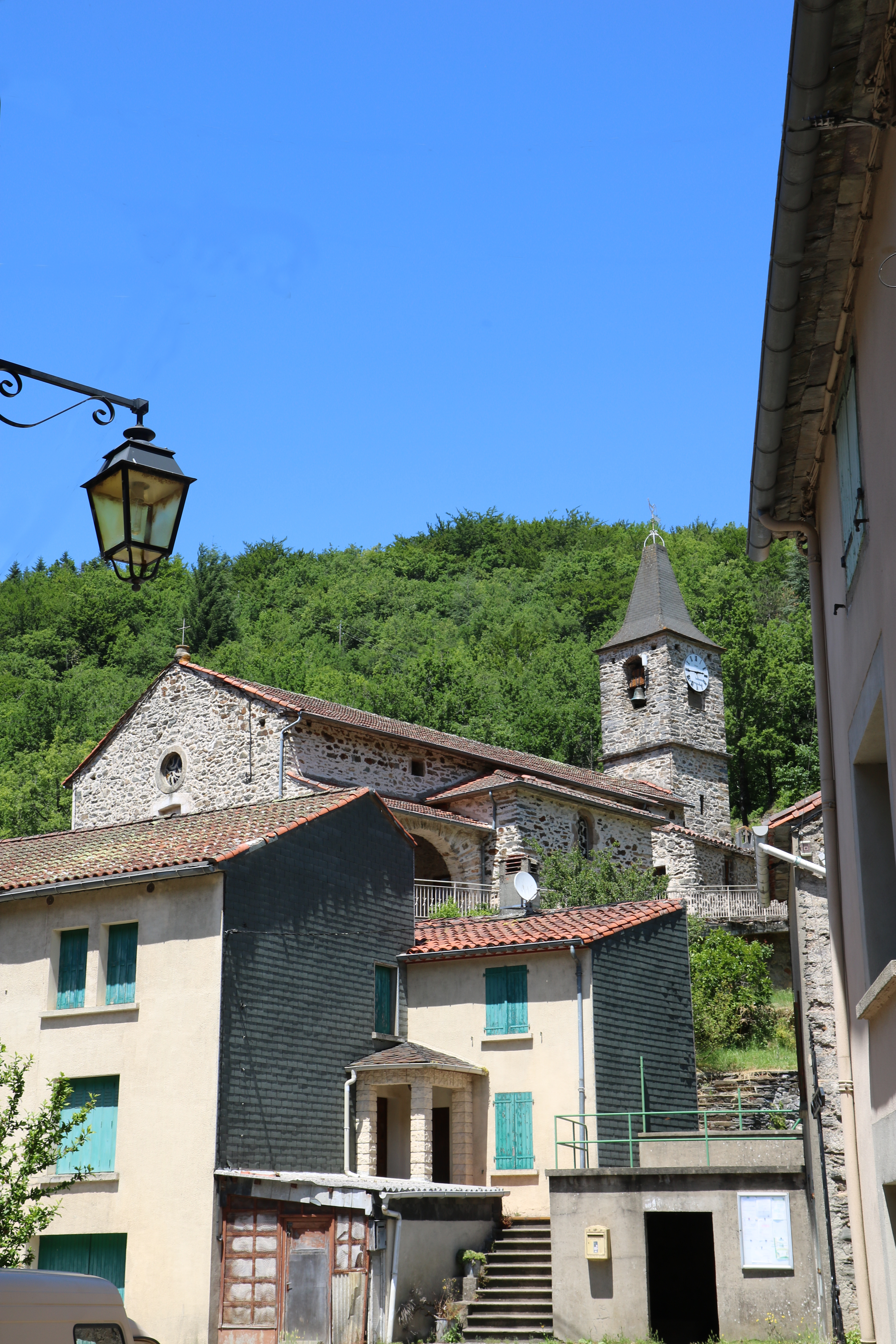 Verreries-de-Moussans (Hérault) - vue de l'église Saint-Thomas